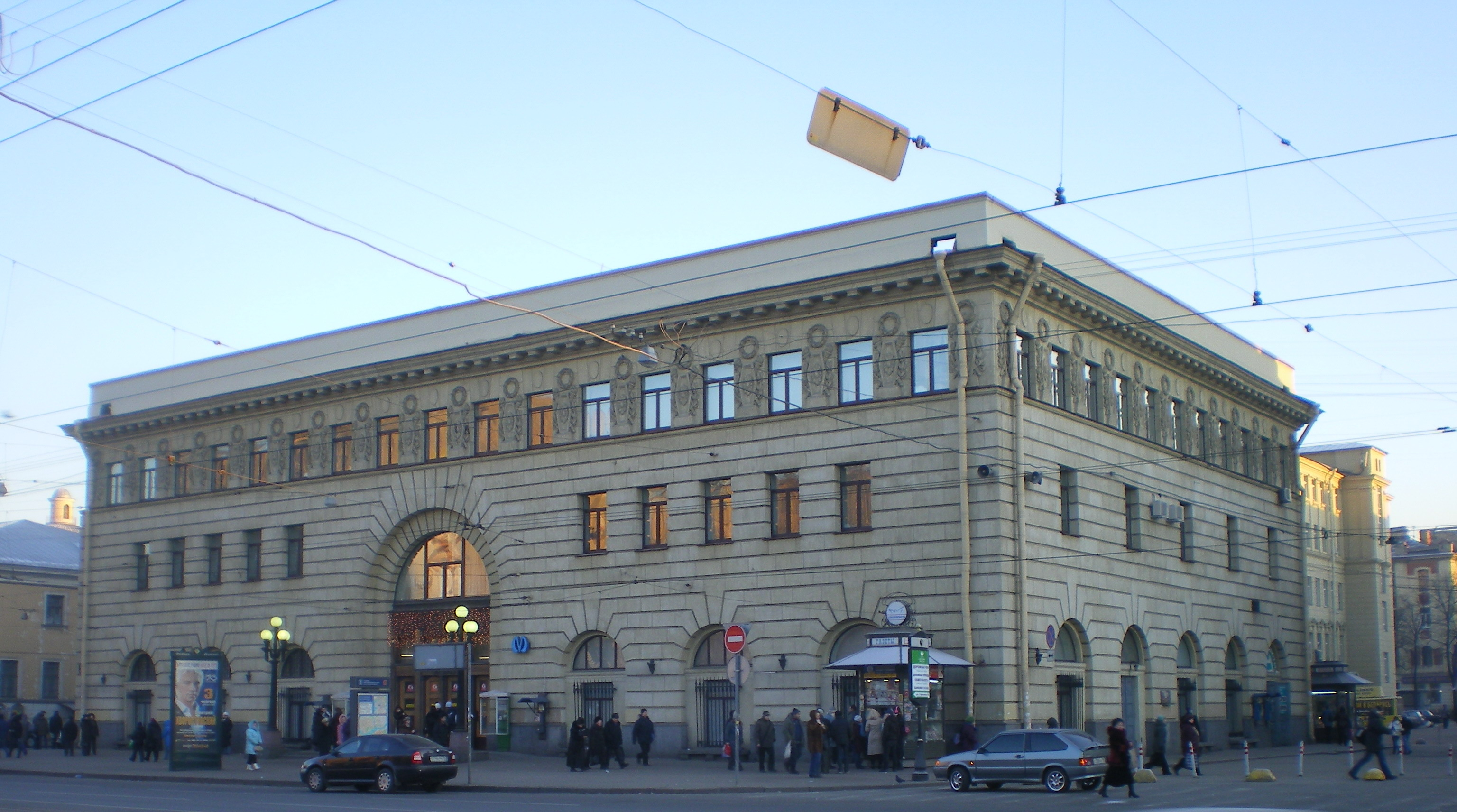 Вестибюль станции метро «Пушкинская» в Санкт-Петербурге